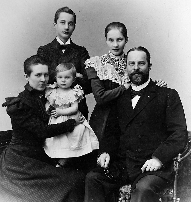 Friedrich Karl David Bouché mit seiner Familie. Vermutlich ist die Benennung "Friedrich Karl David Bouché" durch die SLUB/DF ein Irrtum, zumal die zugehörige Karteikarte nur den Nachnamen nennt. Wahrscheinlich handelt es sich richtig um Johann Carl Friedrich Bouché (1850-1933), der in Dresden tätig war.